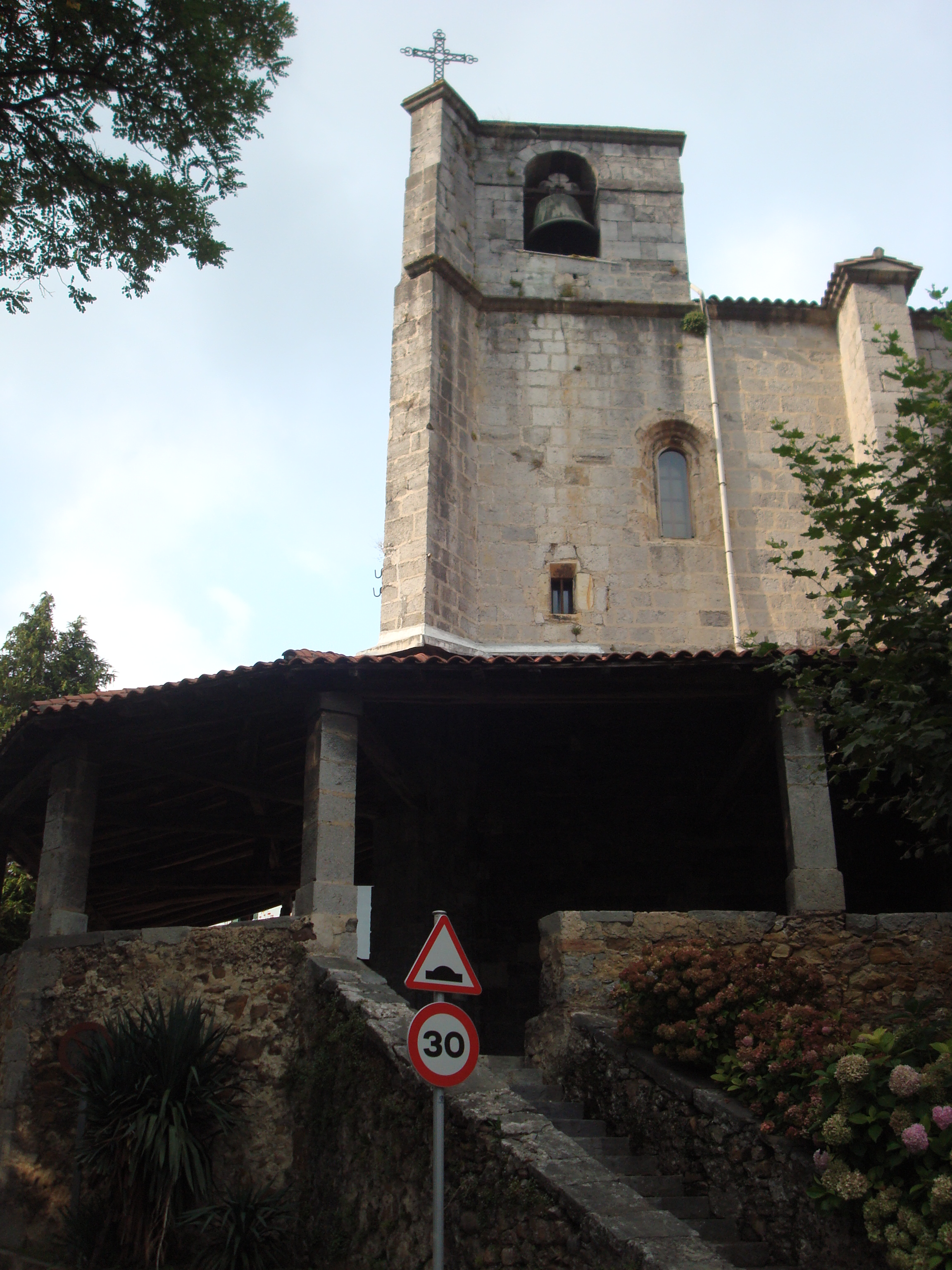 Vista general de la iglesia